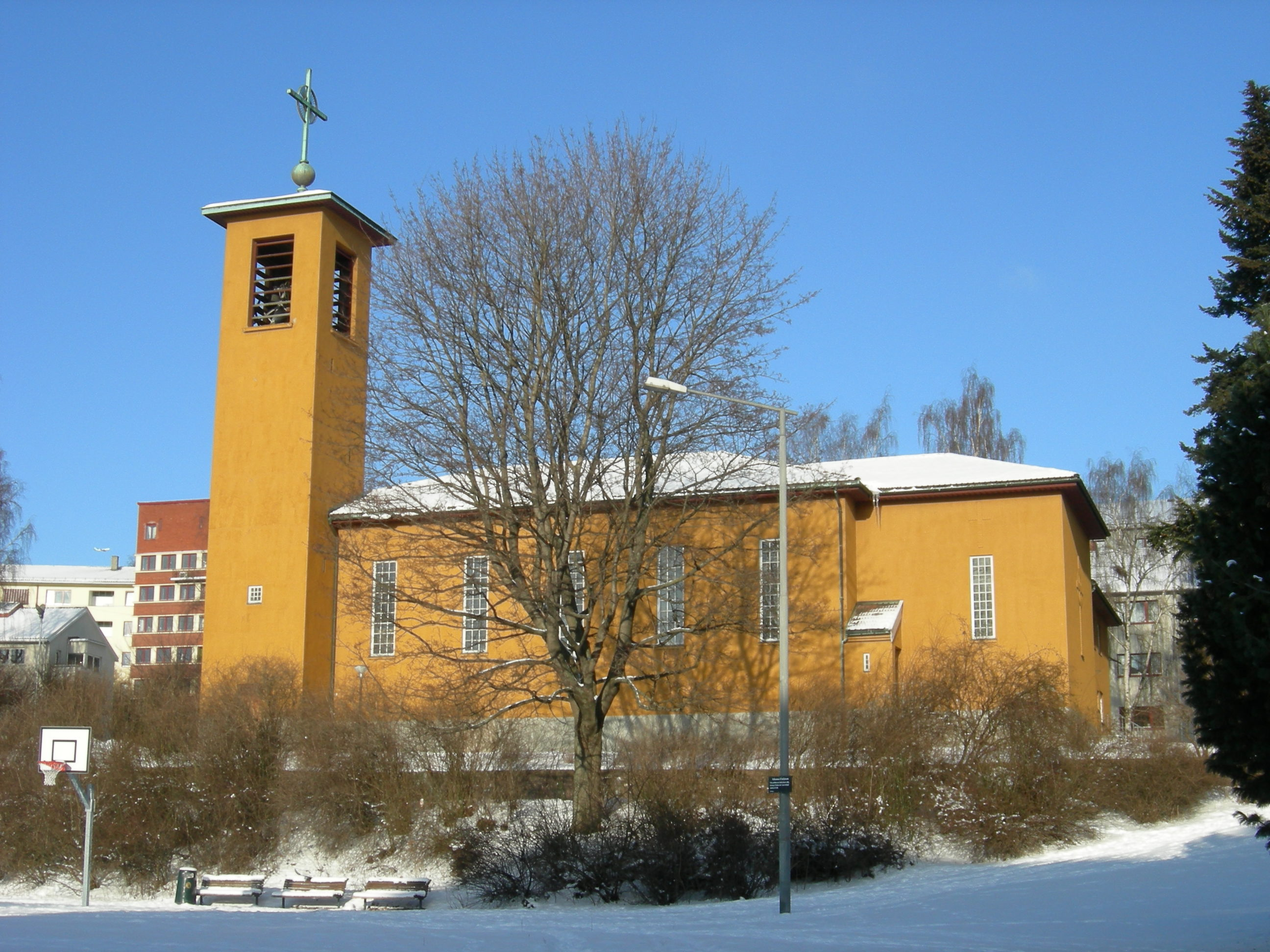 Iladalen kirke (church), Ila, Oslo